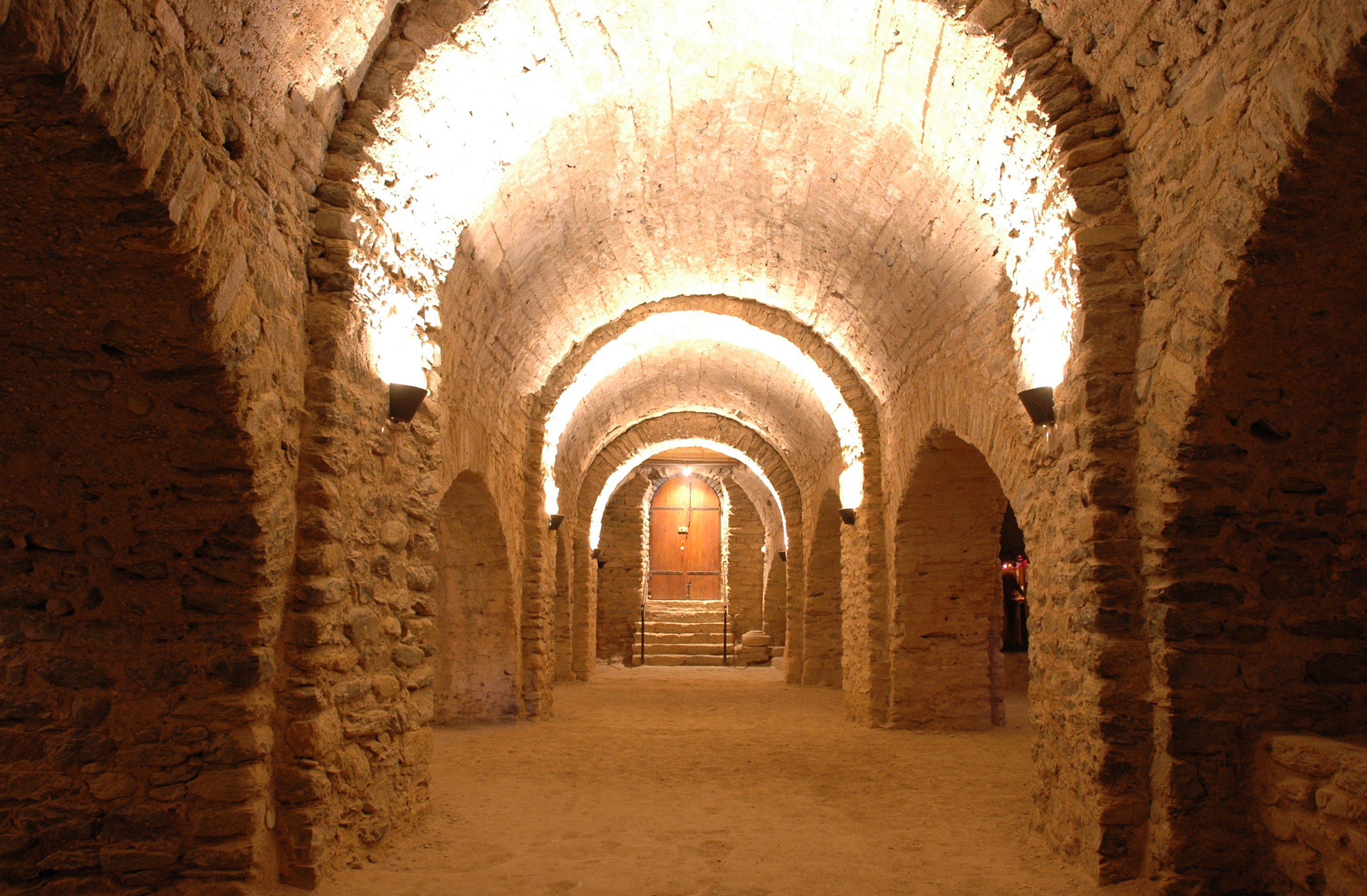 Sant Miquel de Cuixà - Església preromànica